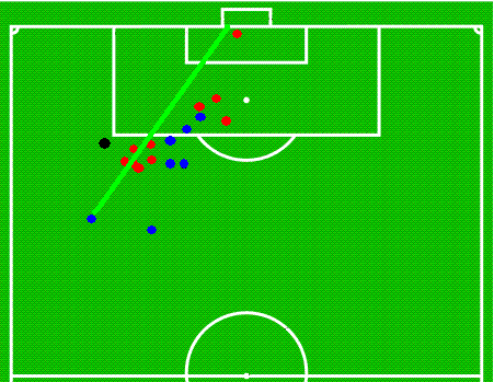 Se conoce popularmente como «gol del terremoto» a una recordada e histórica anotación señalada durante un partido de fútbol por el jugador uruguayo José Perdomo vistiendo la camiseta de Gimnasia y Esgrima frente a su clásico rival Estudiantes de la Plata, en un partido válido por la séptima fecha del Clausura 92 de Primera División de Argentina el 5 de abril de 1992, que finalizó Estudiantes 0 - Gimnasia 1.